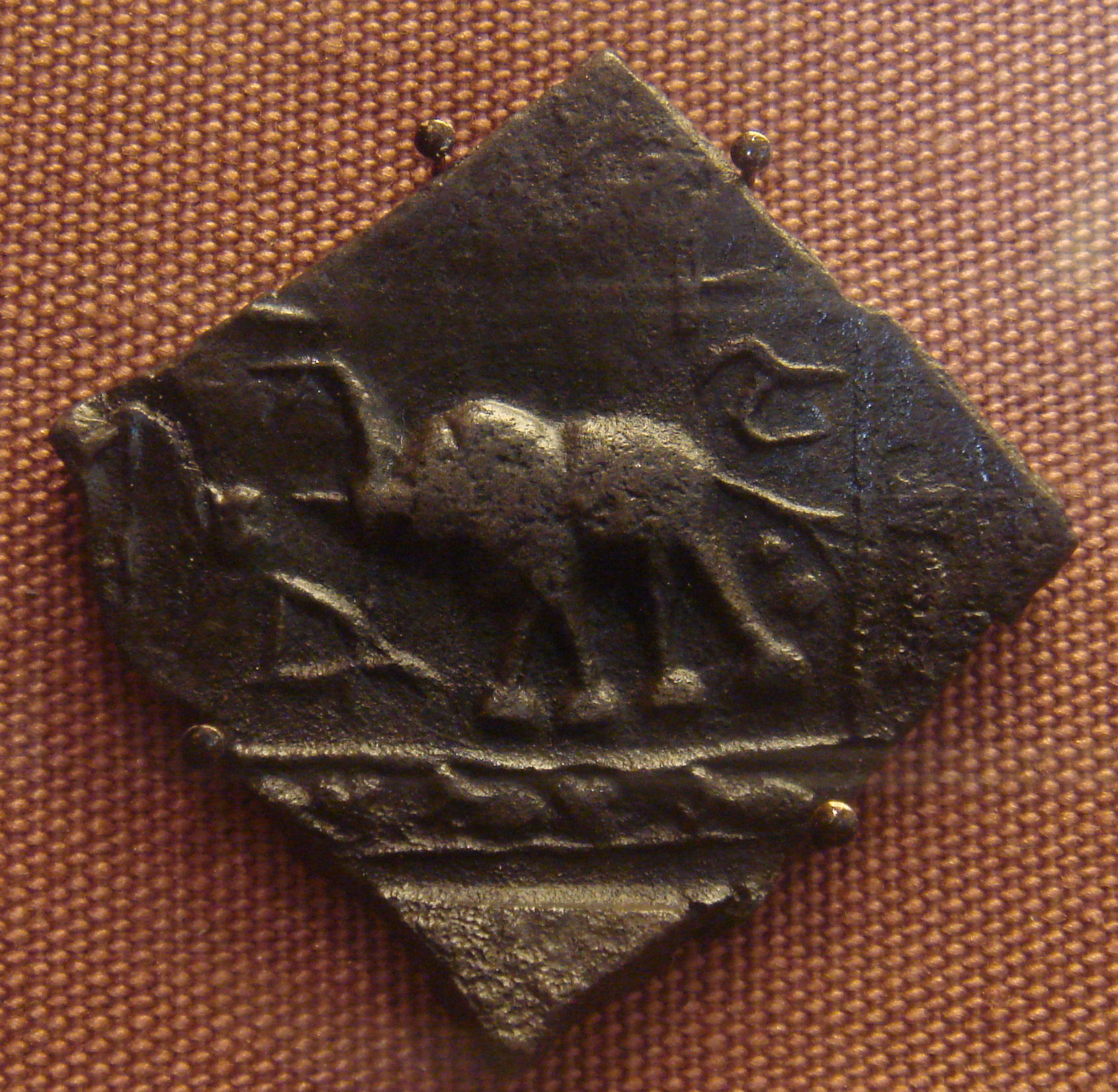 Satavahana 1st Century BCE Coin Inscribed In Brahmi:(Sataka)Nisa